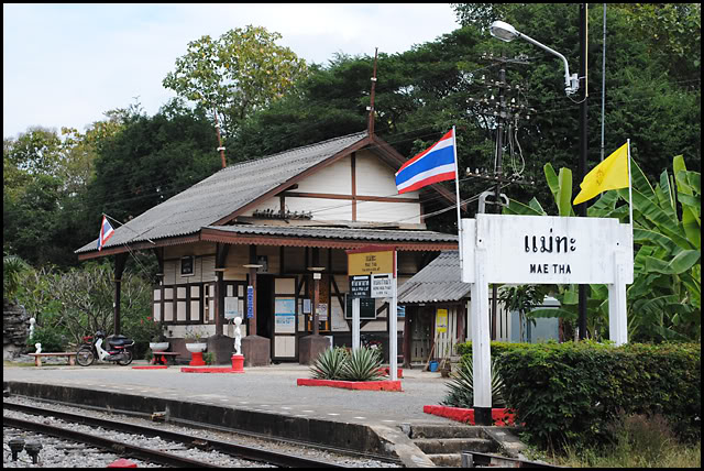 ป้าย และอาคารสถานีรถไฟ